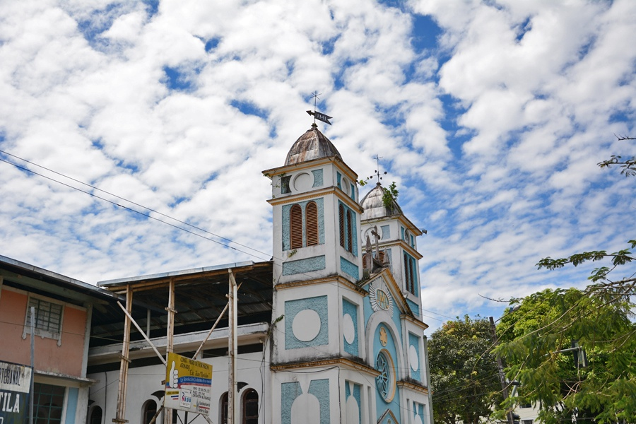 Kirche im Stadtzentrum von Tena